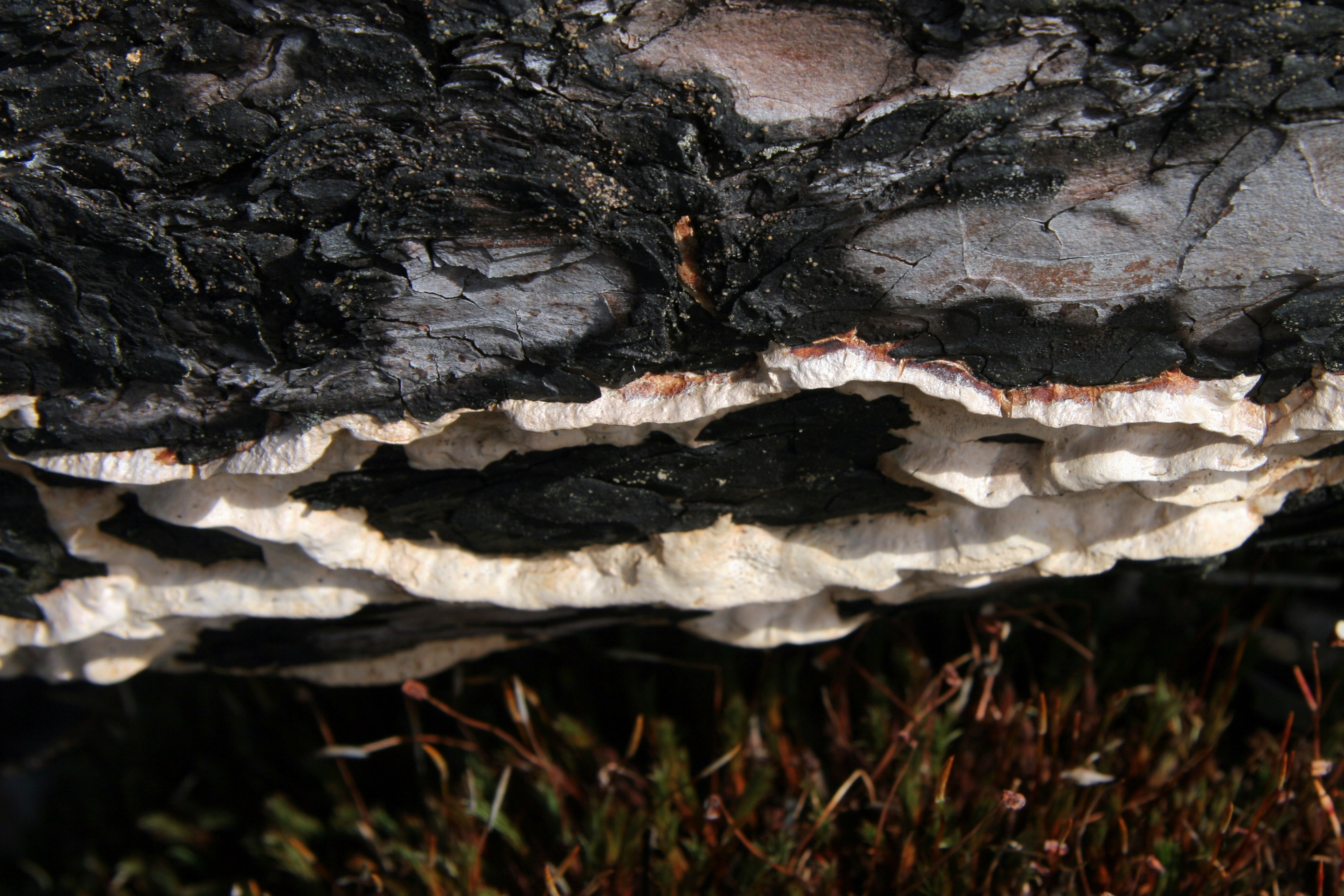 Skorpticka